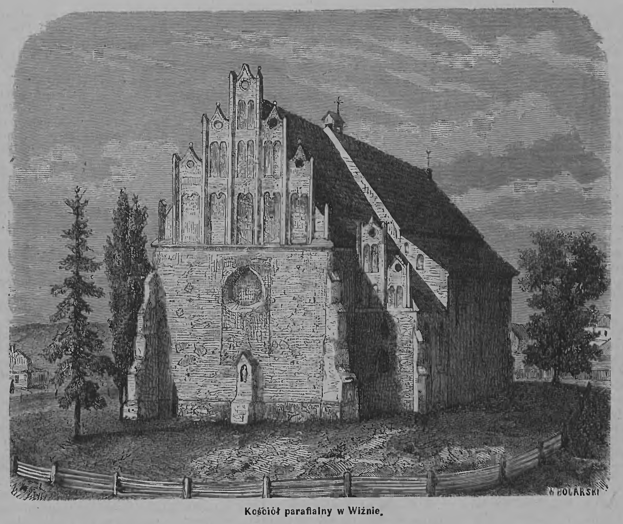 Kościół w Wiźnie - ilustracja z Tygodnika Ilustrowanego z 1870